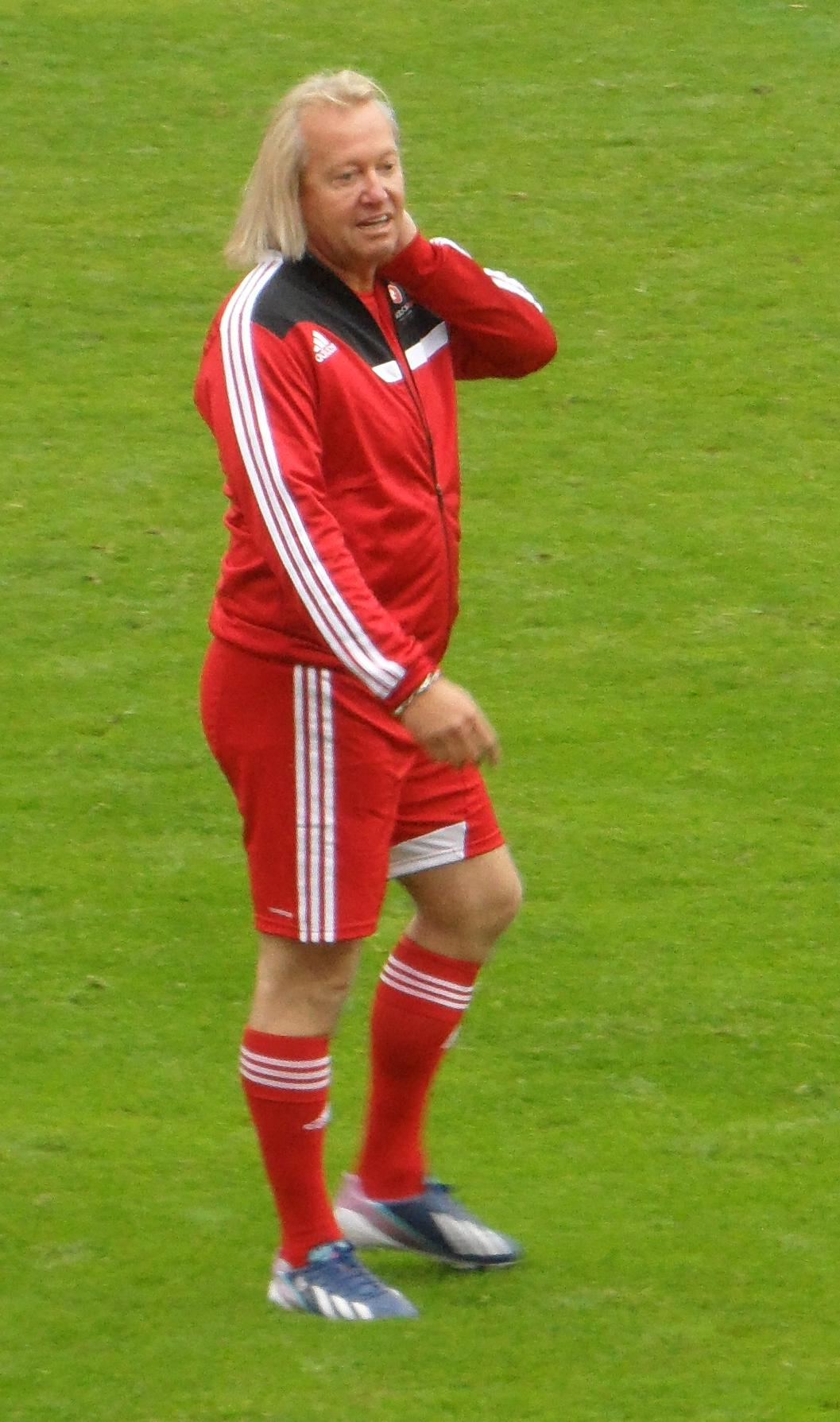 Robert Geiss beim Benefiz-Fußball-Spiel unter dem Motto „Kicken für den guten Zweck“